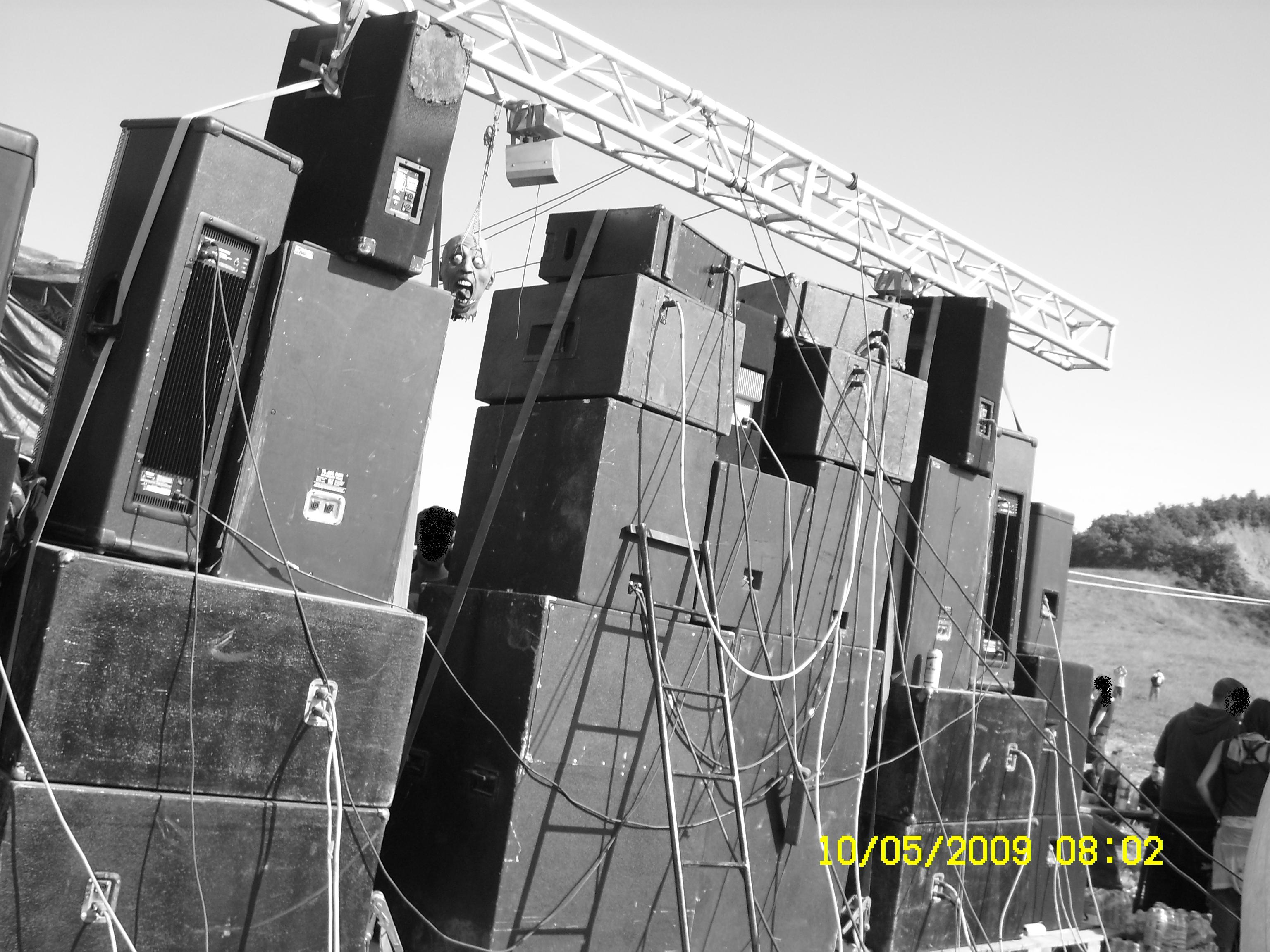 A rear sound system viev.